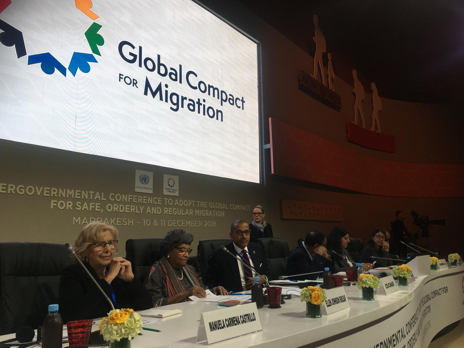 La alcaldesa de Madrid, Manuela Carmena, ha abogado por establecer oficinas de contacto entre los Gobiernos de las ciudades origen de las migraciones y los de las ciudades destinatarias de ellas a fin de establecer, utilizando para ello las estructuras de que dispone la ONU, un sistema ordenado y seguro de estos movimientos. La propuesta la ha formulado durante su intervención en la cumbre del Pacto Mundial para la Migración, impulsado por las Naciones Unidas, que se está celebrando desde ayer, lunes, en Marrakech (Marruecos).